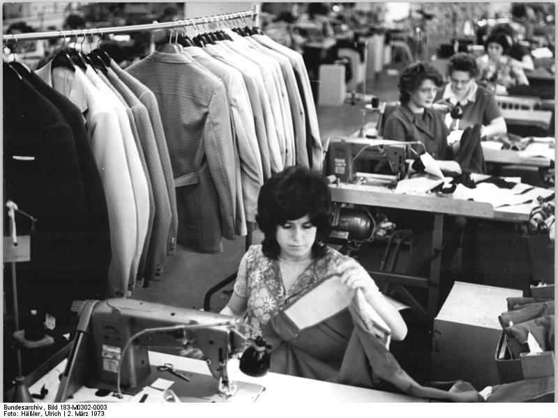 ADN-ZB-Häßler-2.3.1973-ku-Bez. Dresden: Täglich 12 Sakkos mehr konnten die Werktätigen des VEB Herrenmode Dresden, Werk Bischofswerda, in diesem Jahr an die Abnehmer liefern. Die Konfektionsarbeiter haben dieses Ergebnis durch ausgezeichnete Qualifizierungsarbeit bereits im Jahre 1972 vorbereitet. Die Näherinnen benötigten dadurch eine kürzere Einarbeitungszeit für die neuen Konfektionsstücke. Die Näherin Christina Gottschling fertigt auf unserem Foto eines der "Präsent 20"-Sakkos. Gegenüber 1972 wollen die Werktätigen dieses Wettbewerbsinitiativbetriebes ihre Arbeitsproduktivität um 8,3 Prozent steigern.